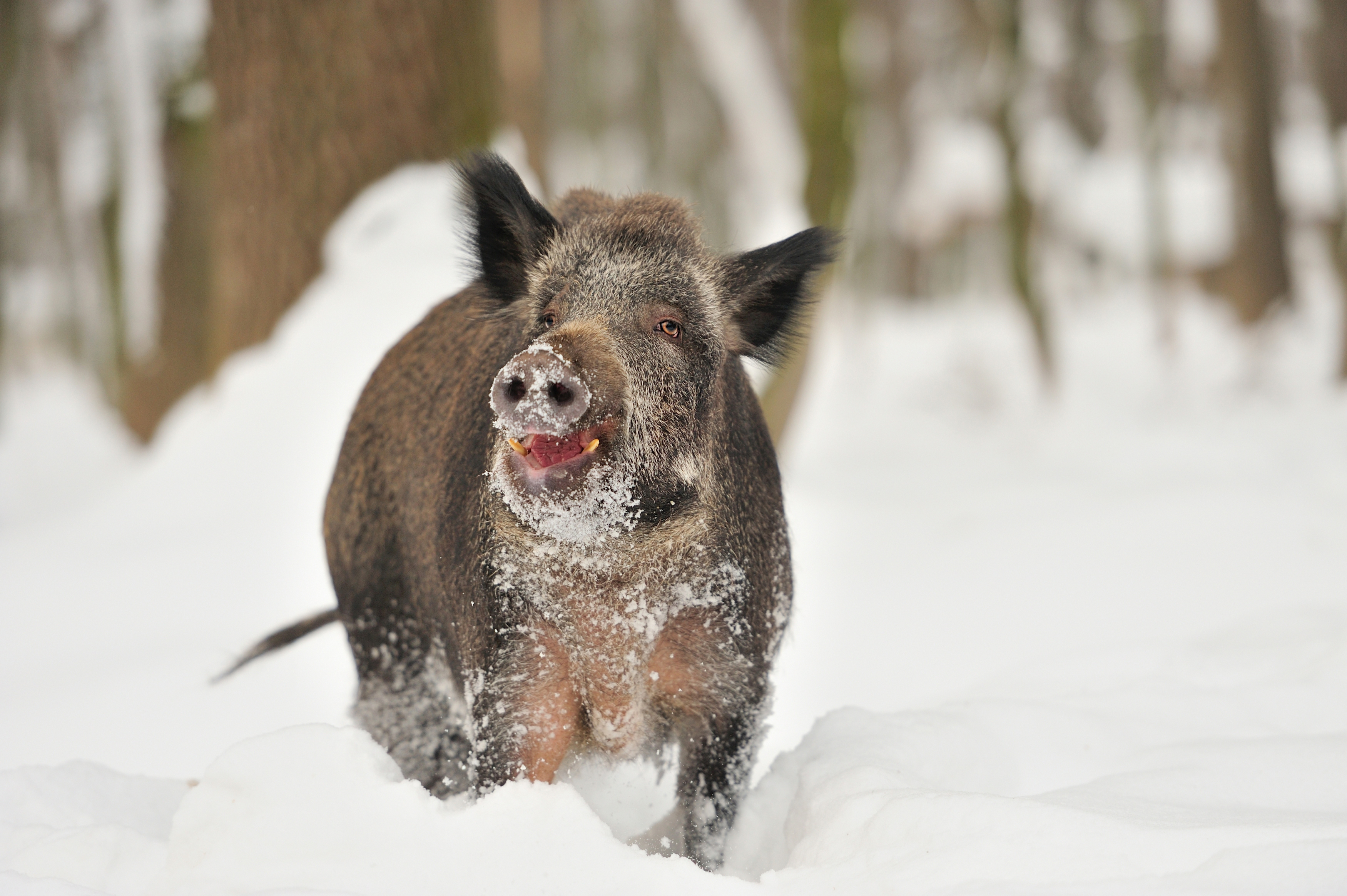 Кабан дикий в лісовому урочищі «Дача Галілея», Чортківський район.